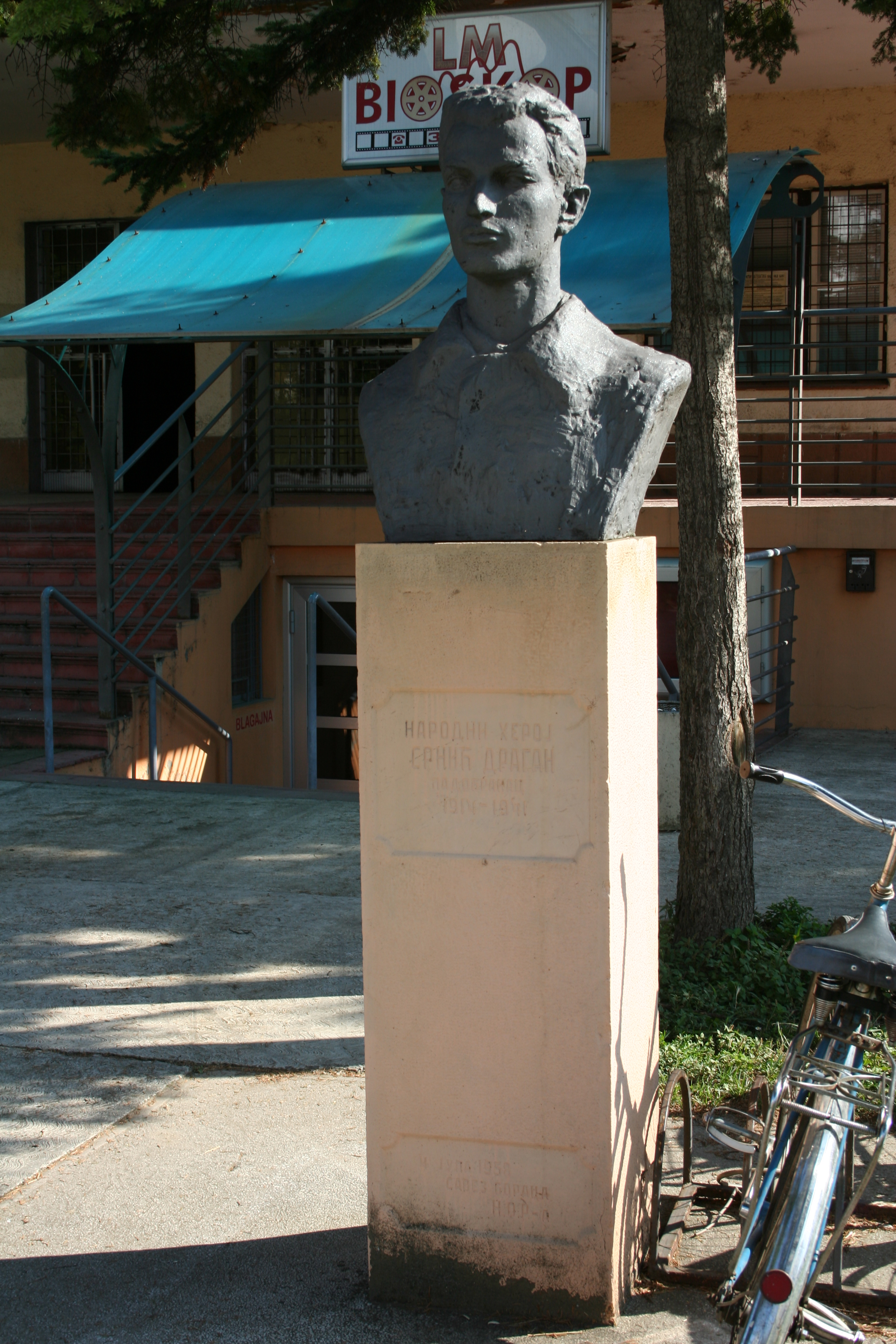 Narodni univerzitet, Spomenik Draganu Srniću, Šabac